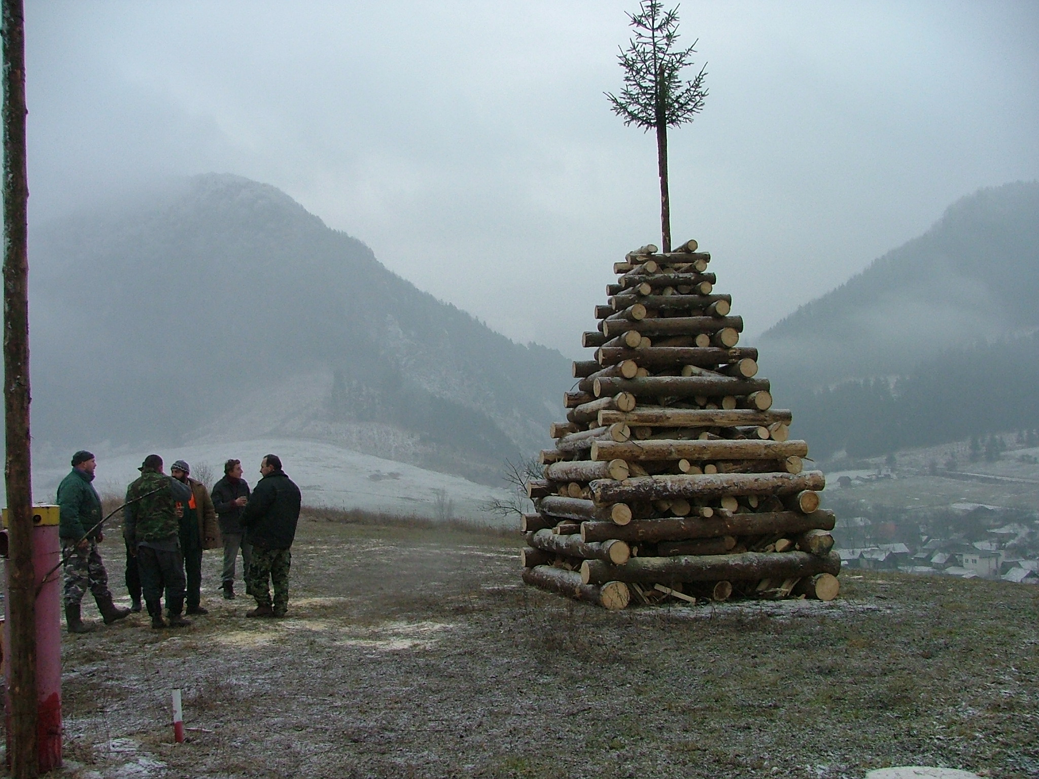 Višňové